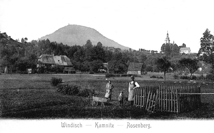 Windisch-Kamnitz (Srbská Kamenice) mit dem Rosenberg (Růžovský vrch)